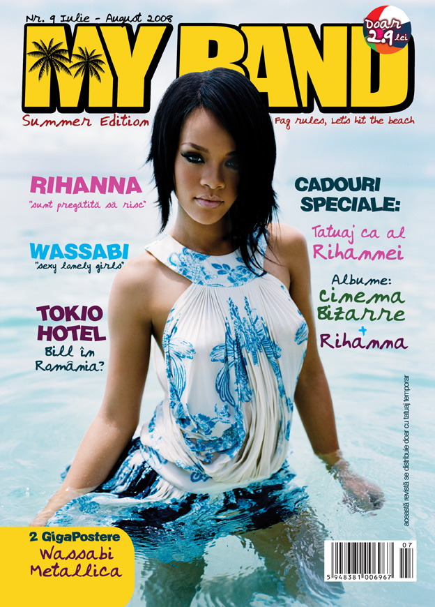 MyBand numarul 9, Rihanna